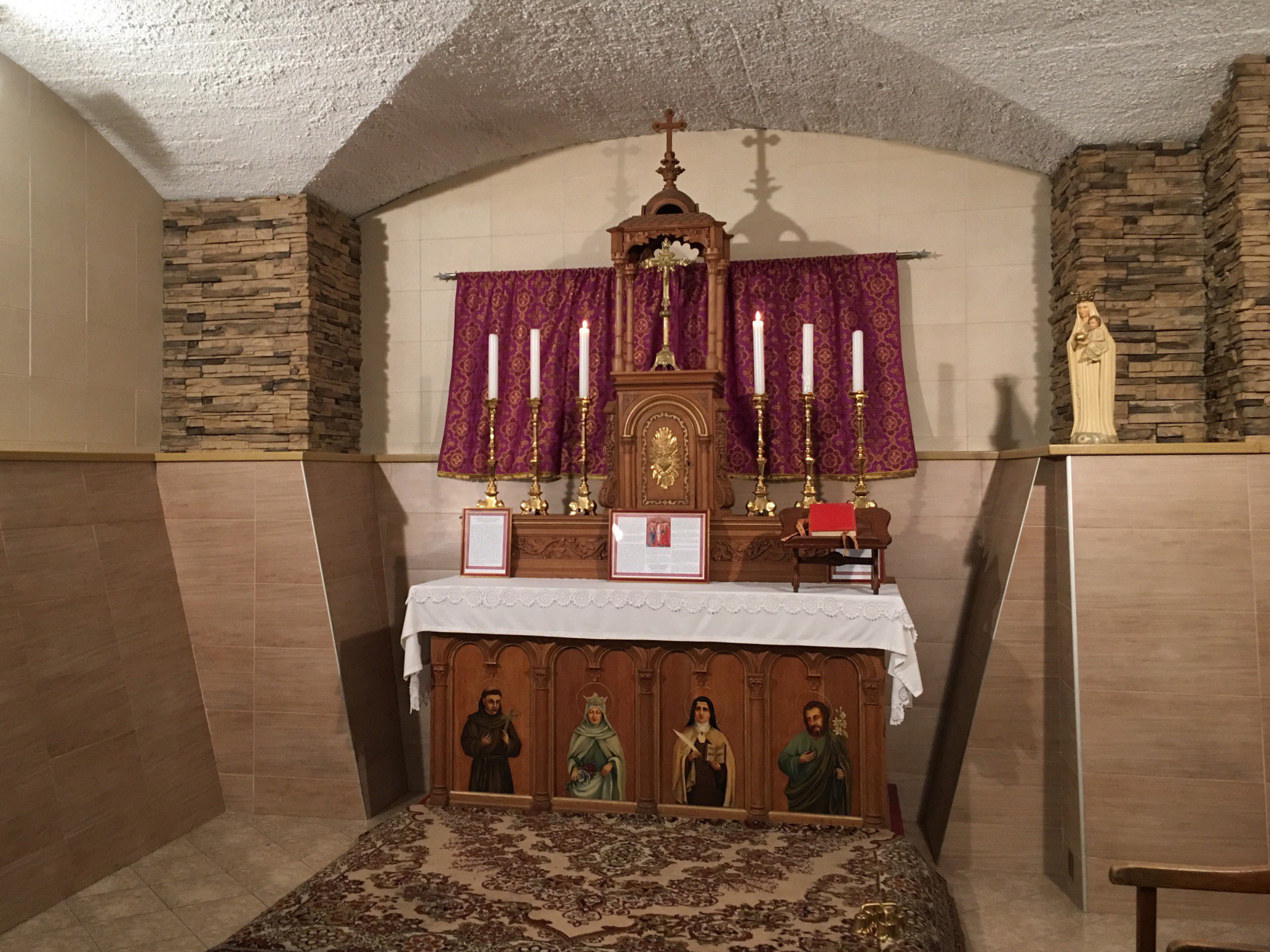 Алтарь часовни в крипте Римско-католического Кафедрального собора Непорочного зачатия Пресвятой Девы Марии в Москве.